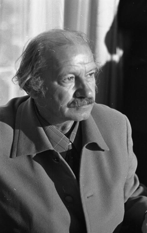 Signierung des Buches "Grob, fein und göttlich" durch die Autoren HAP [Helmut Andreas Paul Grieshaber] und Frau [Margarete] Hannsmann in der Landesvertretung Baden-Württemberg